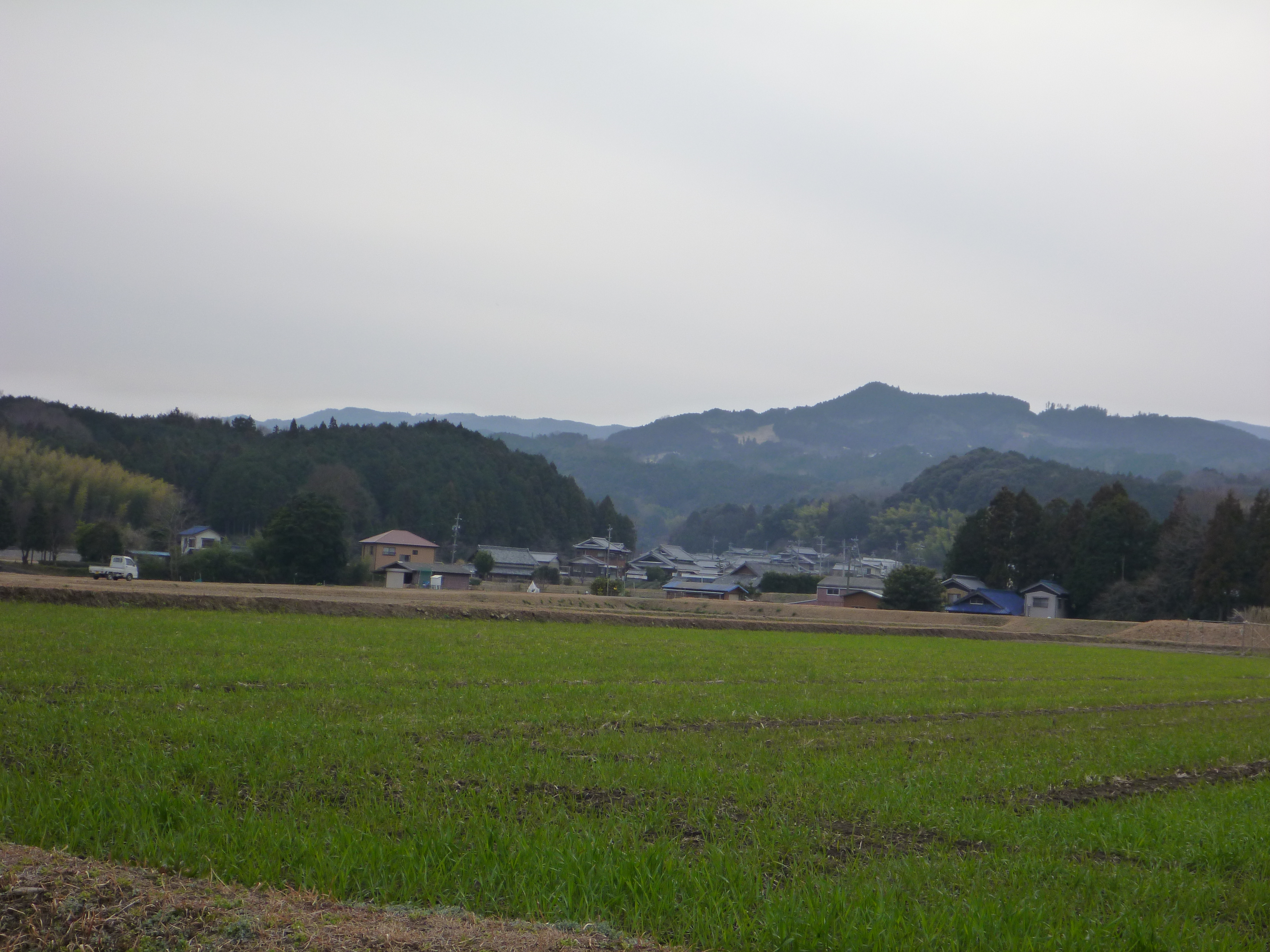 山田野川中流部の水田地帯。三重県津市。 Panasonic Lumix DMC-FT2